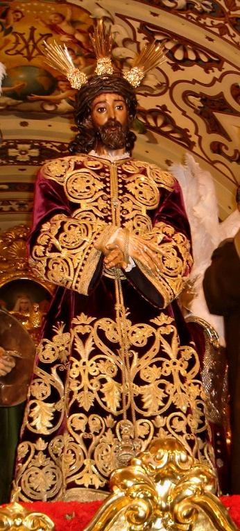 Nuestro Padre Jesús de la Sentencia (Sevilla) by Felipe Morales Nieto